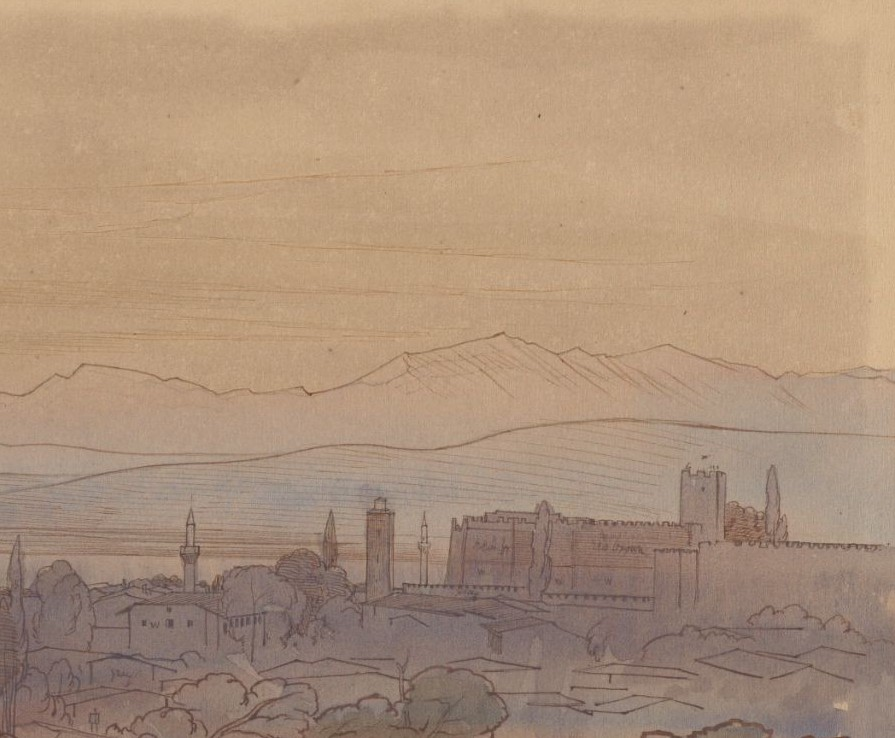 Απόσπασμα από πίνακα του Edvard Lear, όπου διακρίνεται ο Πύργος του Ρολογιού και το Κάστρο της Άρτας, 1849.